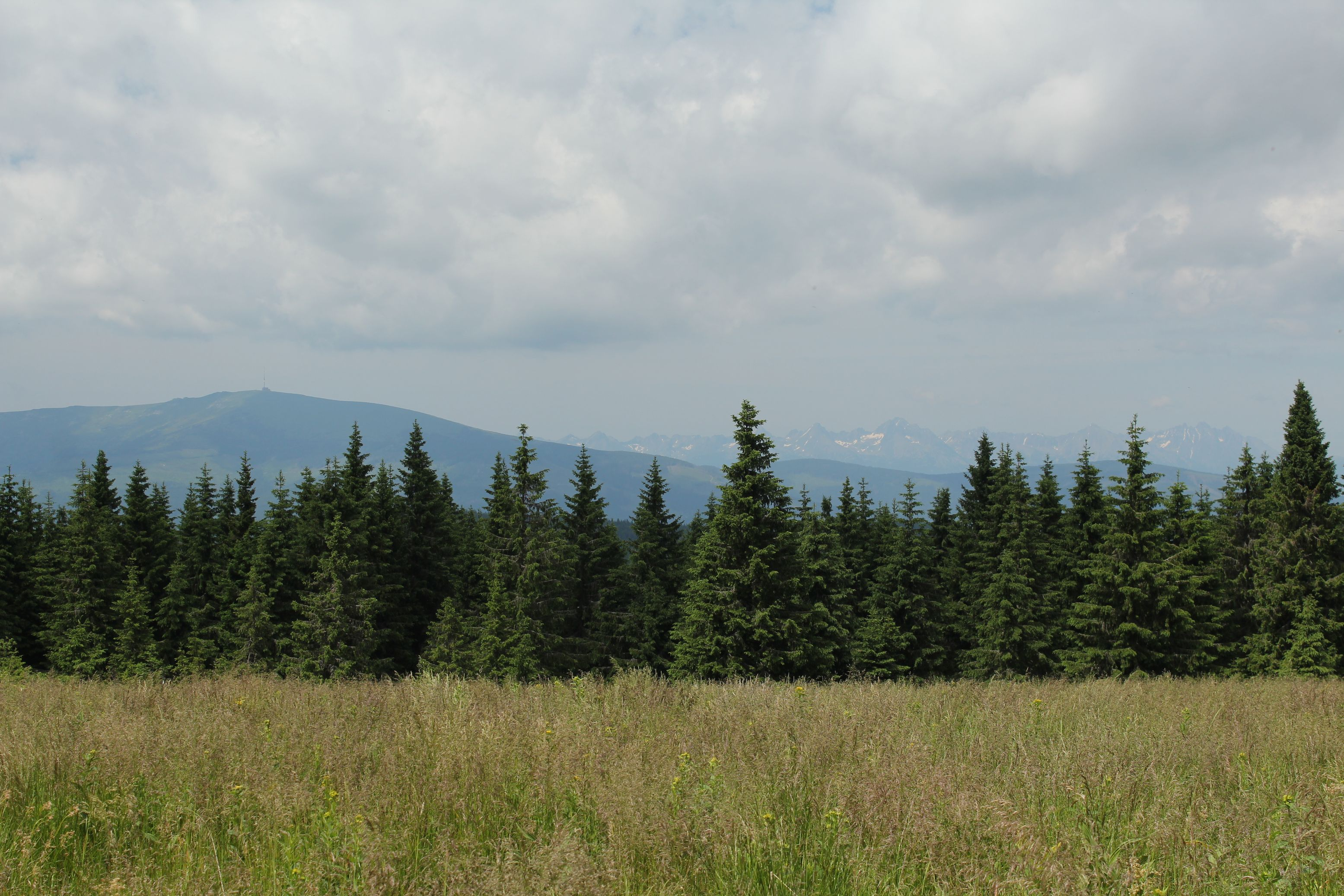 A Stolicán, ezen az erdőszélen ered a Sajó. Szemközt az Alacsony-Tátra (Király-hegy) és a Magas-Tátra csúcsai.